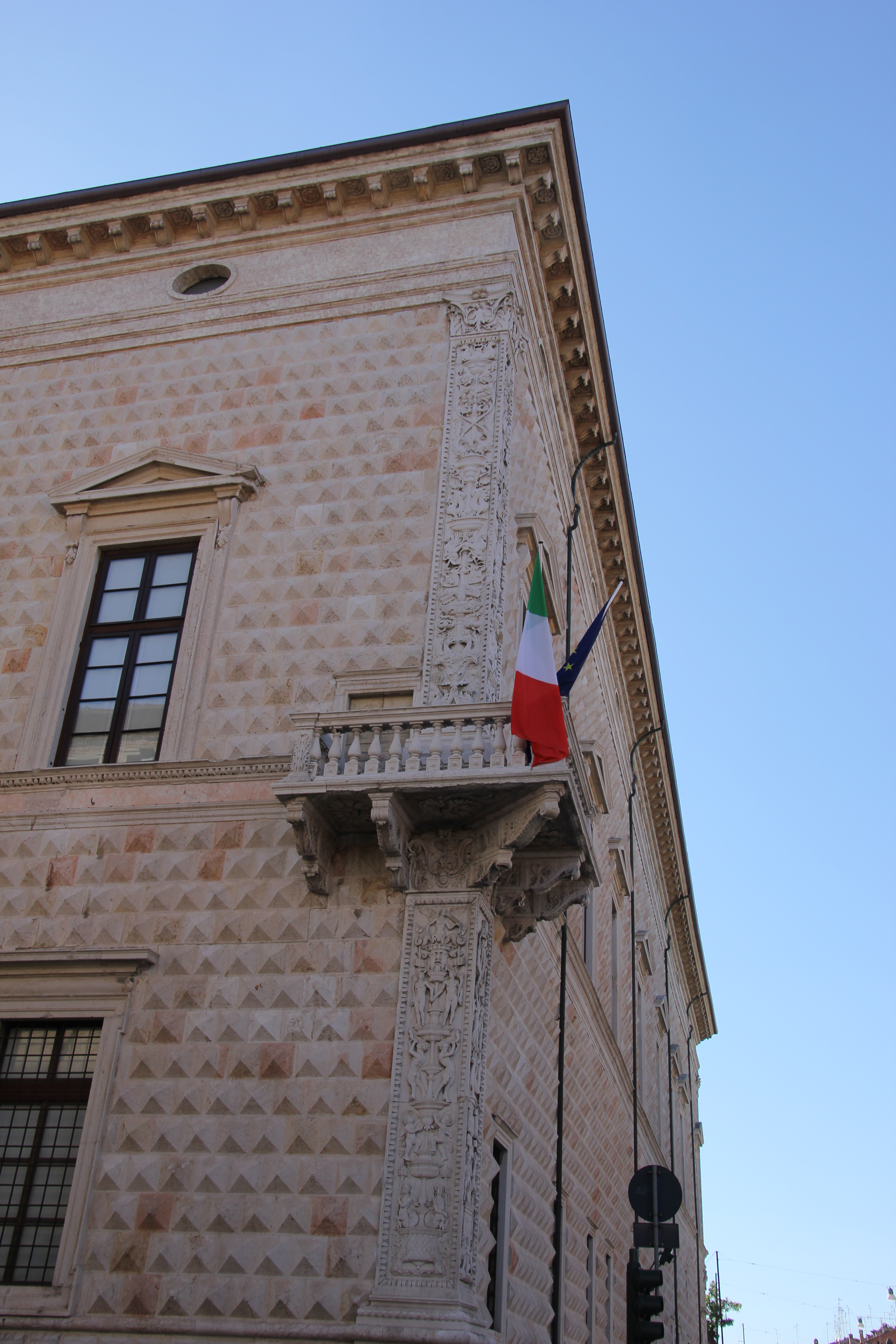 Palazzo dei Diamanti This is a photo of a monument which is part of cultural heritage of Italy.